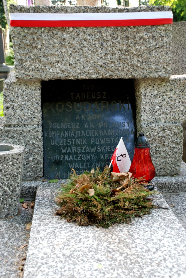 Tadeusz Kosudarski, Powązki Wojskowe w Warszawie